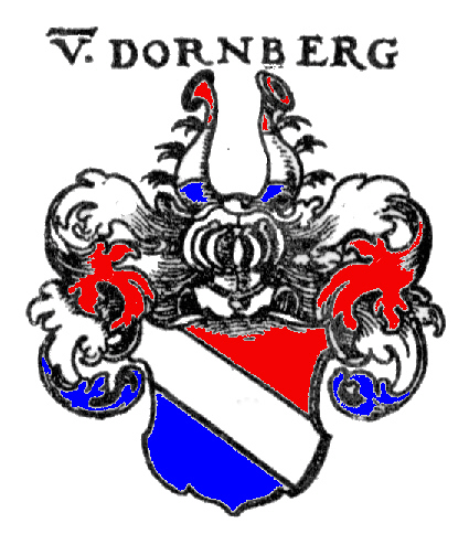 Wappen der Vögte von Dornberg Schalkhausen / Herren von Dornberg